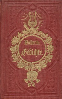 Einband der Ausgabe von Gedichte von Friedrich Hölderlin, 1847